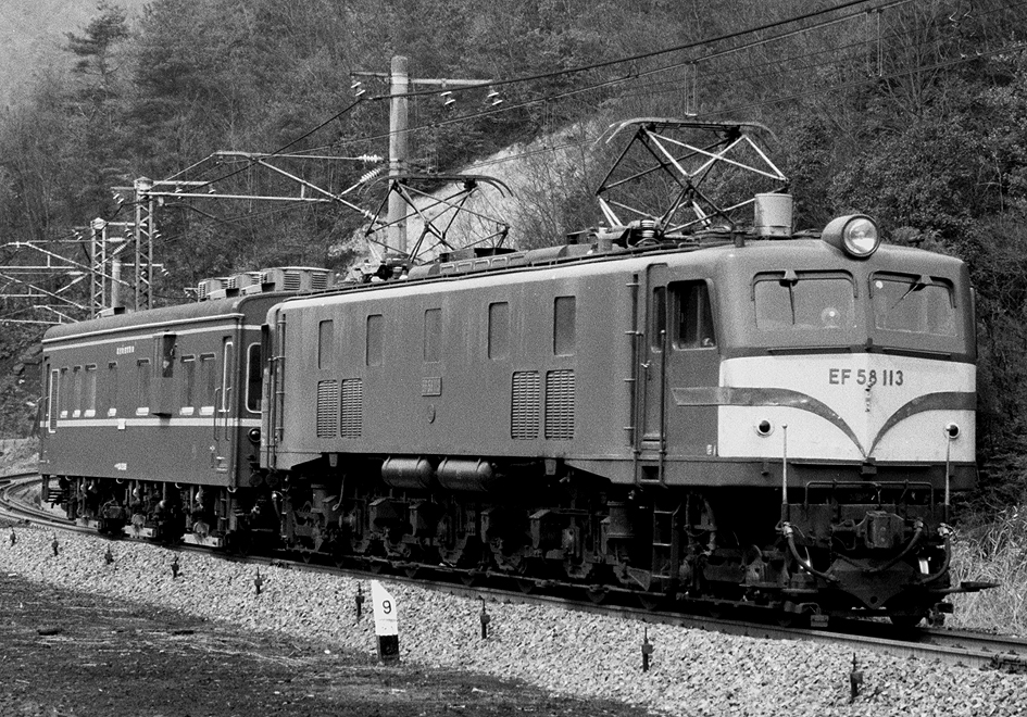 国鉄 EF58 113けん引軌道検測列車 （EF58 113+マヤ34 2006）